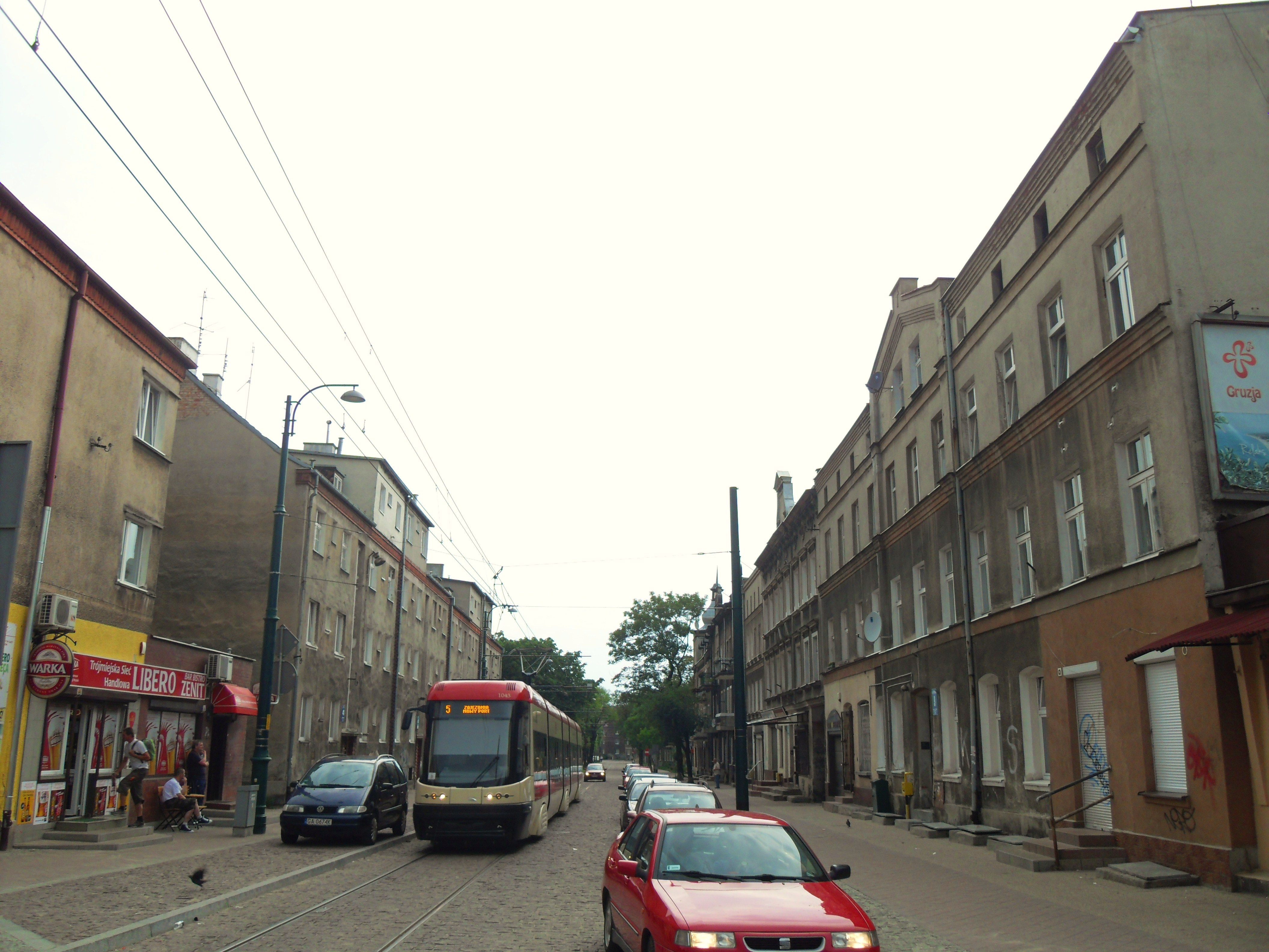 Gdańsk Nowy Port, ul. Wolności.